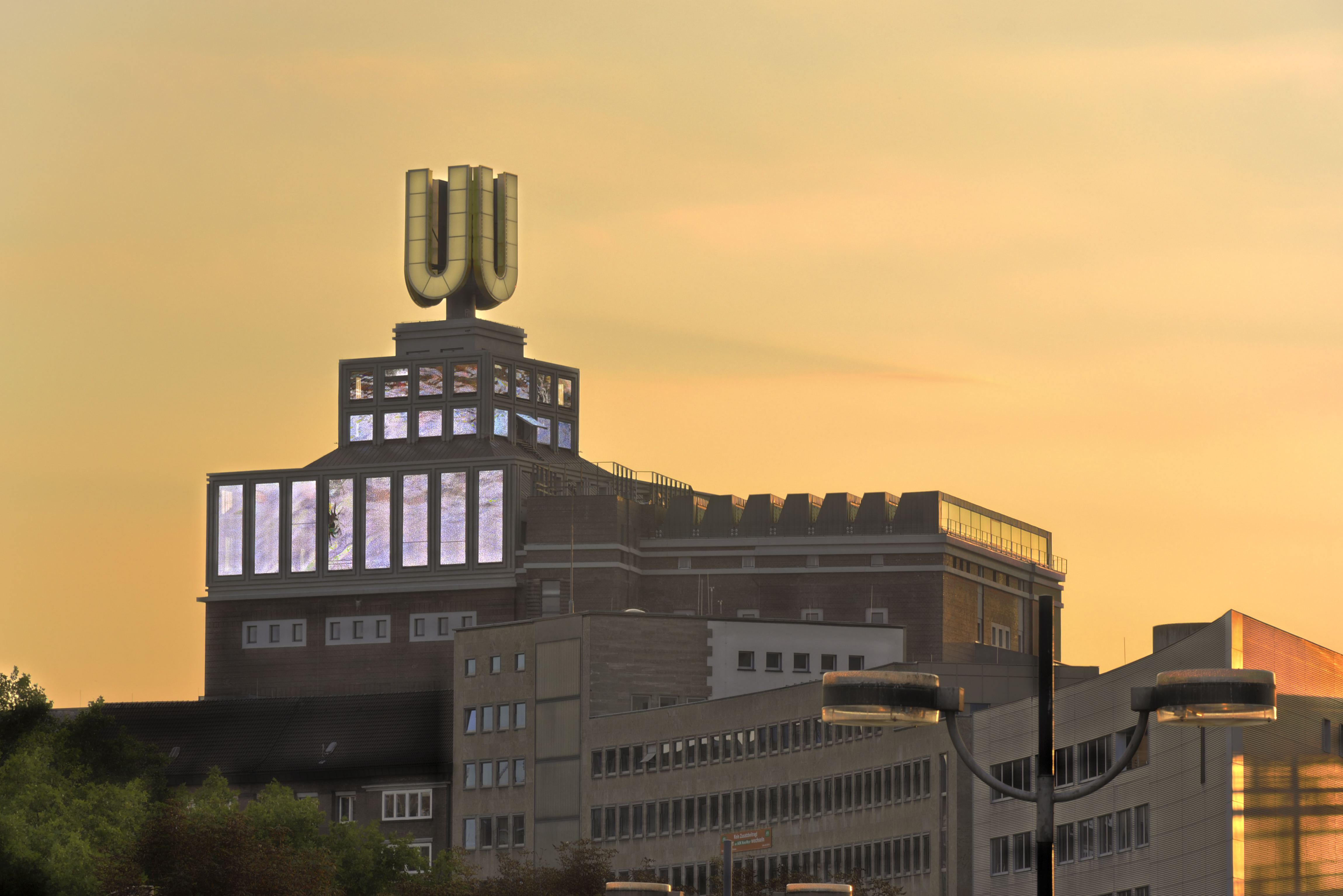 Dortmunder UThis is a photograph of an architectural monument. 0662